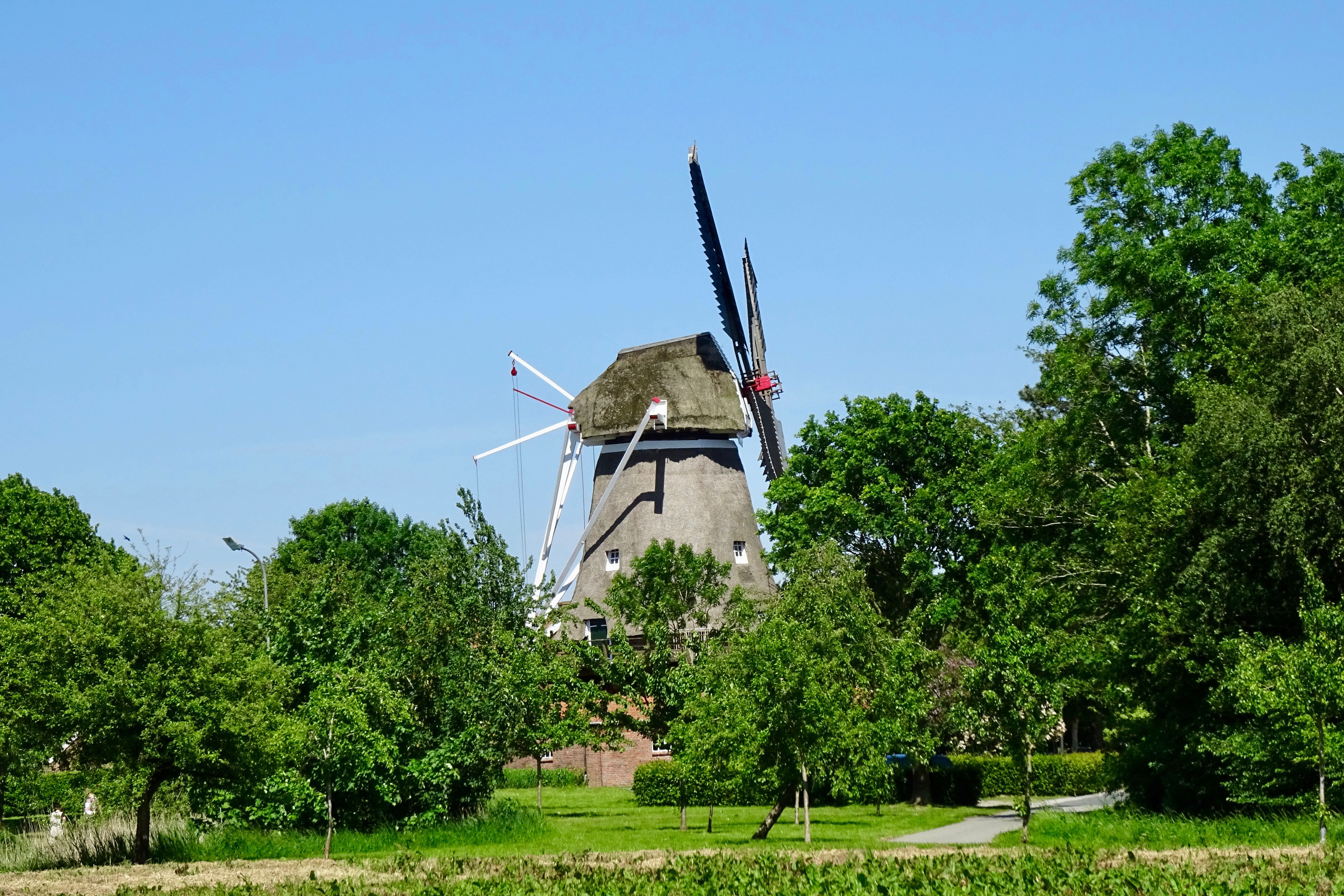 molen in Mitling Mark